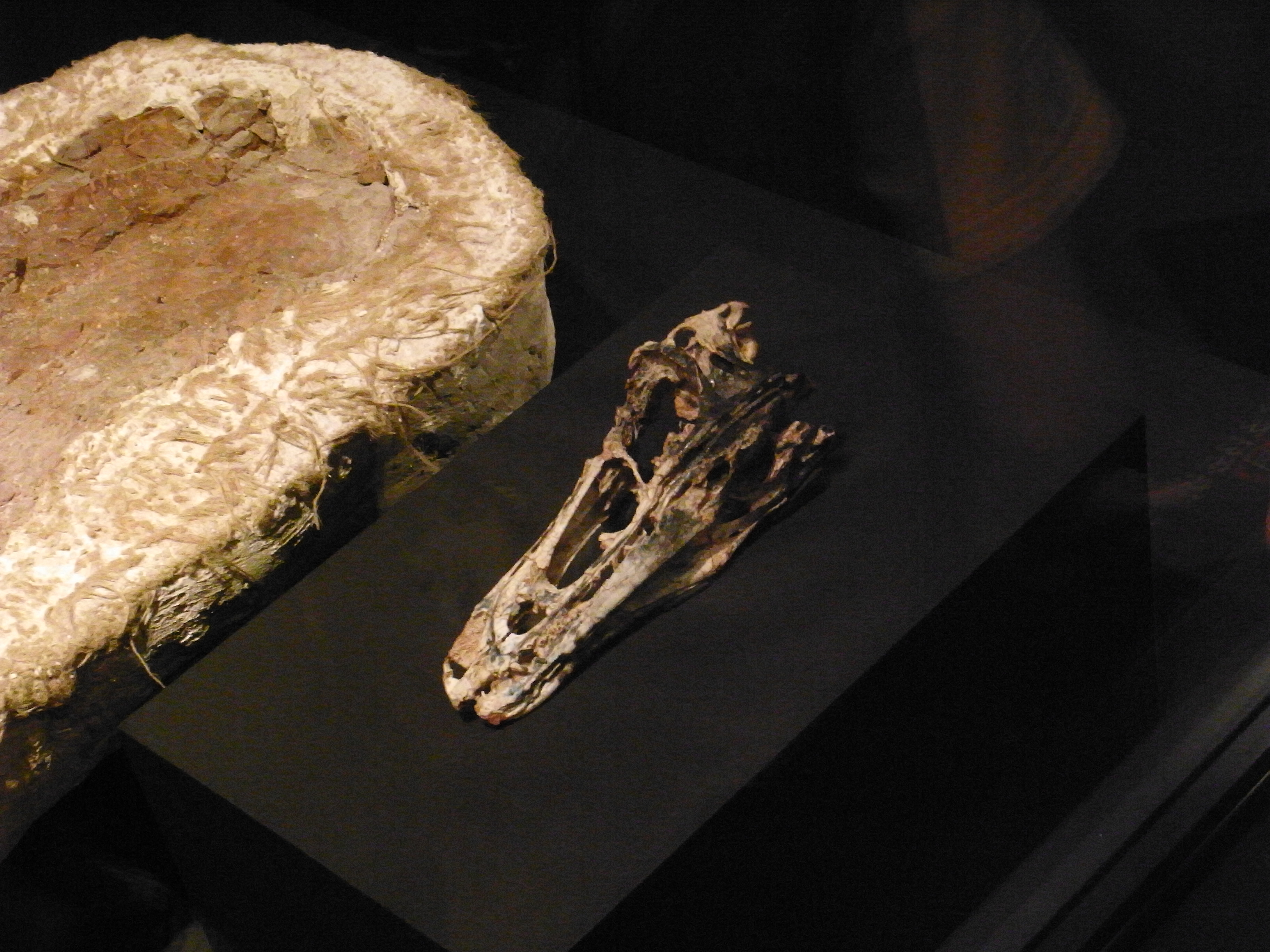 この口の形・・・・Cute＞＜！